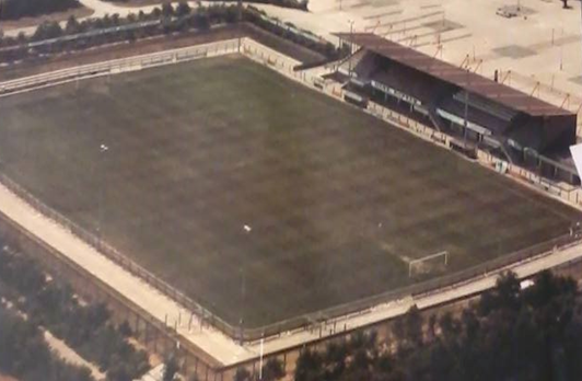 Stadion Meerdijjk eind jaren '80.